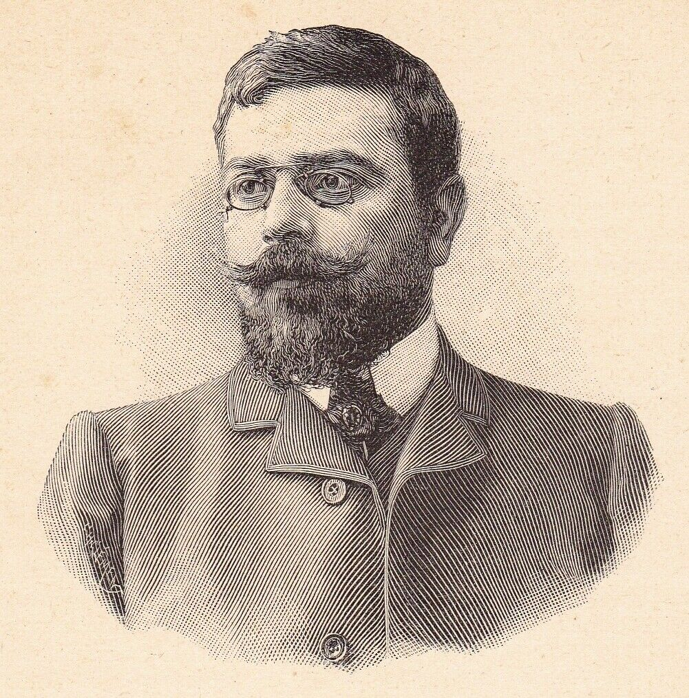 Portrait gravé d'Henri [Achille] Zo, publié dans Figures contemporaines d'Angelo Mariani en 1904, p. 259 [1].